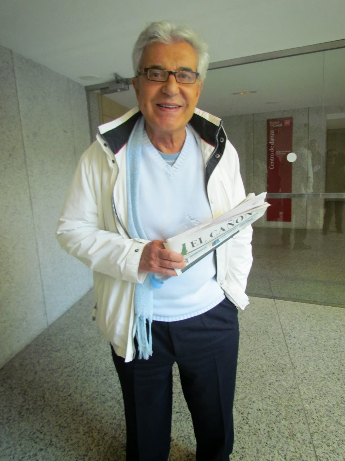 Andrés Pajares en 2014